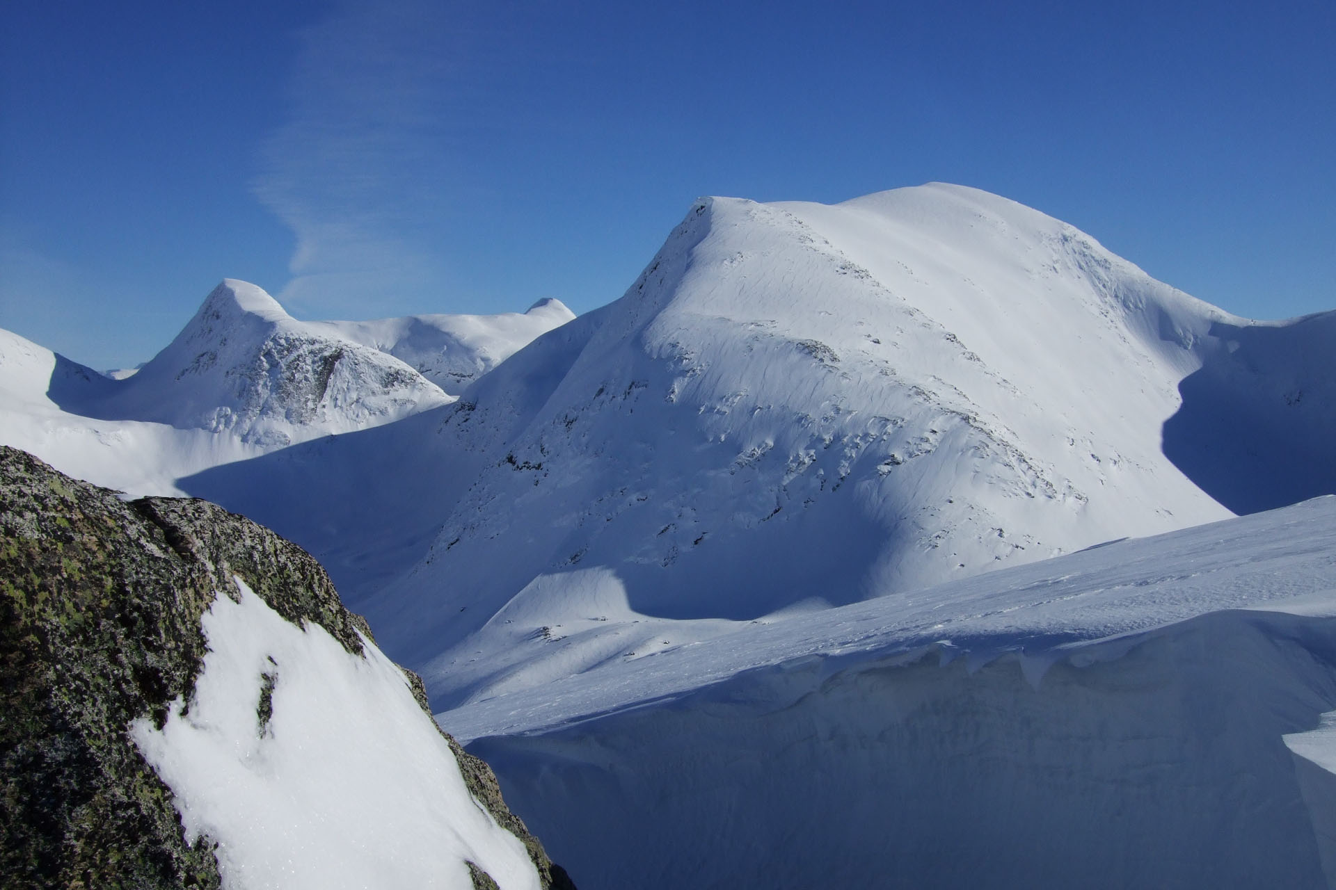 Utsikt frå Nonsteinfjellet (Bjønnjen). Kragefjellet til høgre, Steindalsegga til venstre